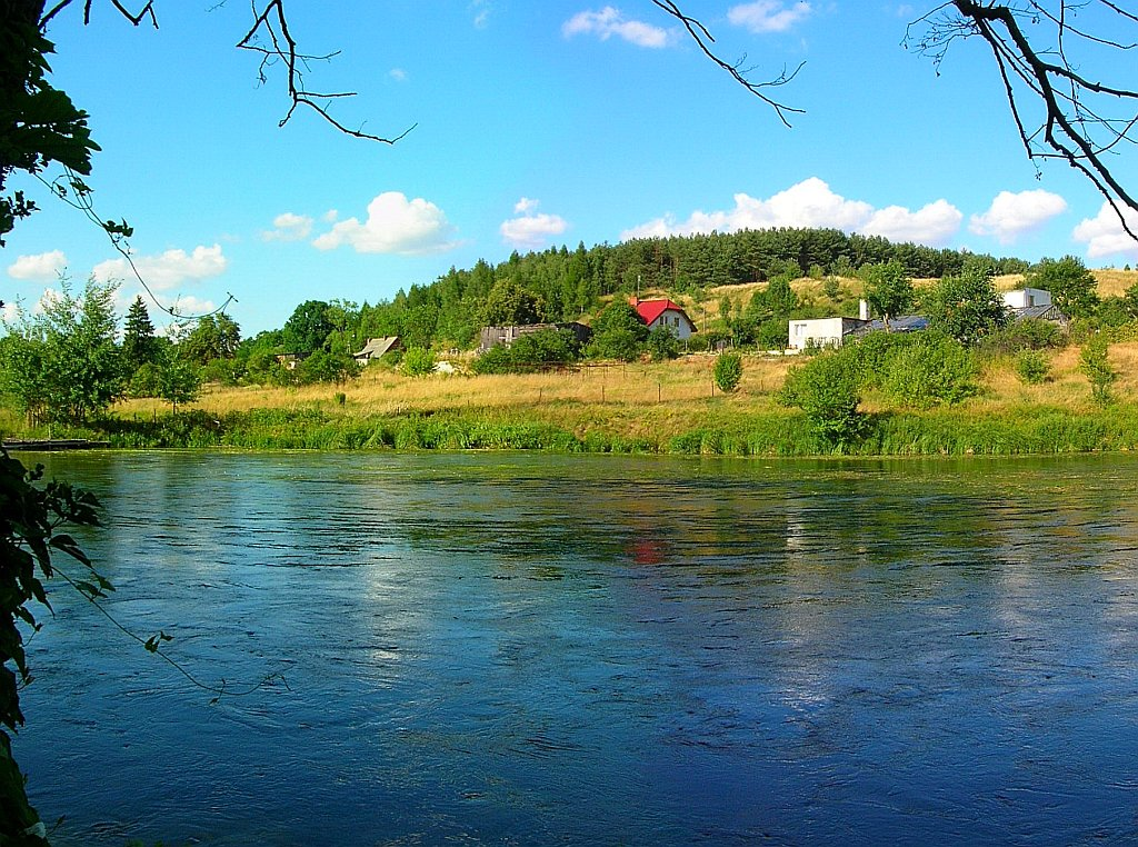 Brda na osiedlu Opławiec w Bydgoszczy - widok na skarpę os. Piaski